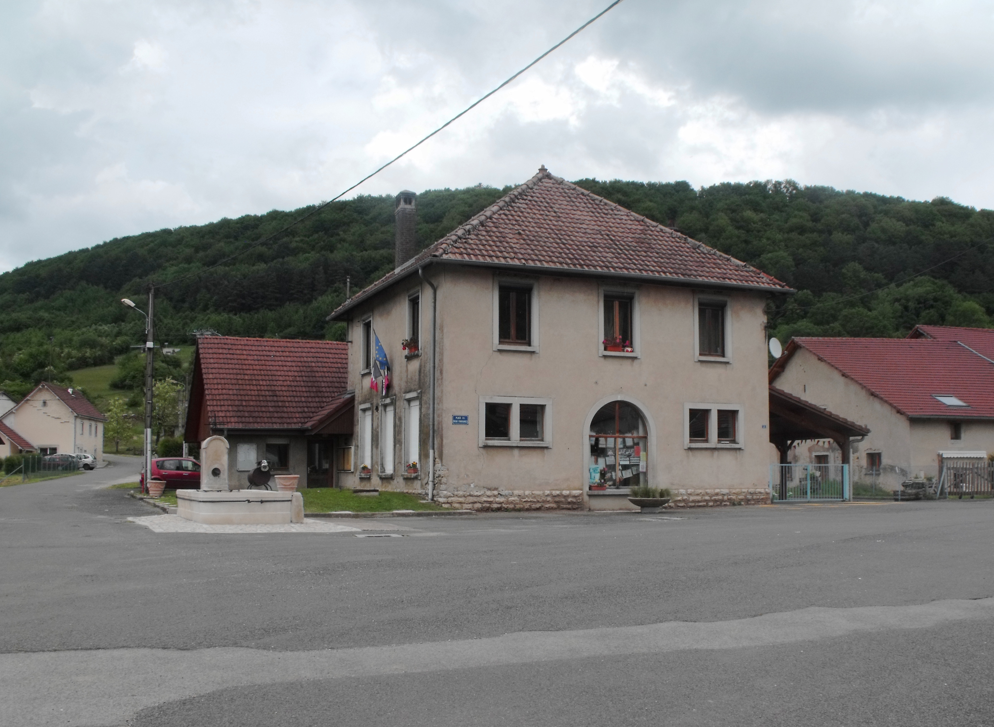 Mairie de Hyémondans, Doubs, France